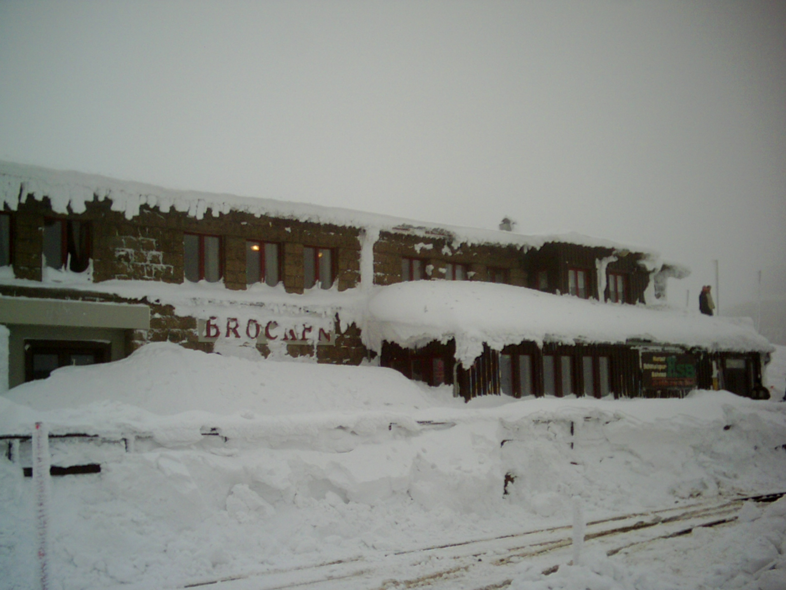 Brockenbahnhof in 1121 m Höhe